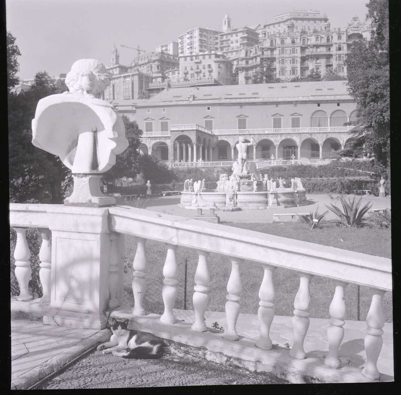 Servizio fotografico : Genova, 1963 / Paolo Monti. - Buste: 12, Fototipi: 12 : Negativo b/n, gelatina bromuro d'argento/ pellicola ; 6x6. - ((Serie costituita da 12 buste sciolte di negativi identificati con i nn.: 7529, 7530, 7531, 7532, 7533, 7534, 7535, 7536, 7537, 7538, 7539, 7540. - La suddetta serie è contenuta nella scatola G7201-7600, formato 24x30. - Il negativo identificato con il numero 46397 è stato realizzato per Zodiac. - Occasione: Documentazione per la pubblicazione: Italia Nostra (a cura di), "Le ville genovesi", catalogo della mostra, Genova 1962, Genova, Comune di Genova, 1967. - Fonte: Agenda di Paolo Monti: R 1 - Monti/ 1 aprile 1963 - 6 giugno 1964/ 6000-8193 (1963-1964), presso Archivio Paolo Monti. - Fonte: Monografia di Italia Nostra (a cura di): Le ville genovesi, catalogo della mostra, Genova 1962, Genova, Comune di Genova (1967). - Fonte: Lettera di Paolo Monti: I. Carteggi/ Genova - Enrico (1963-1966), presso Archivio Paolo Monti. Camicia con documenti dattiloscritti e manoscritti vari relativi al lavoro eseguito per Italia Nostra: preventivi, lettere, inventari. - Fonte: Agenda di Paolo Monti: Archivio fino 1-4-1961/ 31-3-1963 (1961-1963), presso Archivio Paolo Monti